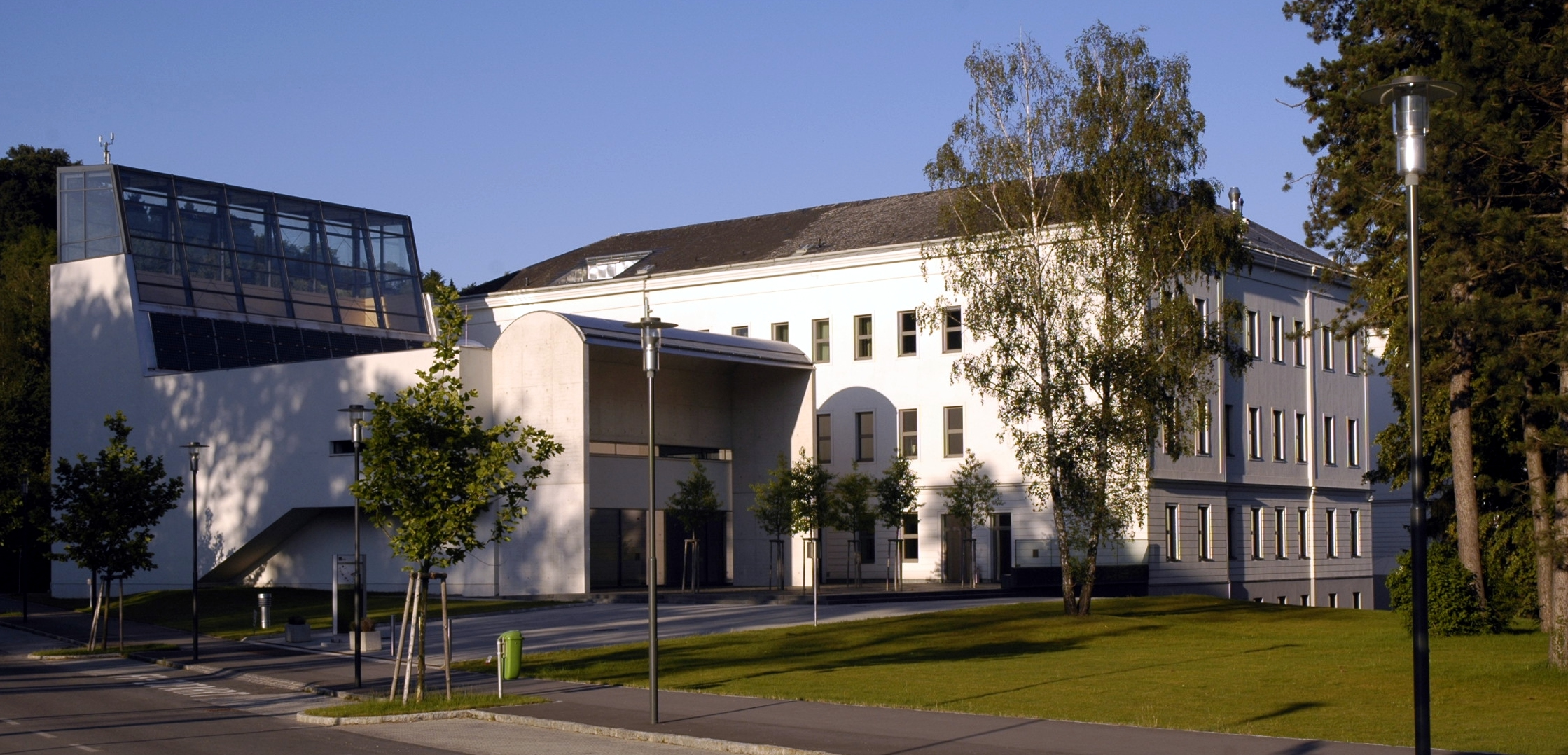 Institute of Science and Technology Austria in Maria Gugging in der Abendsonne vom Westen photographiert